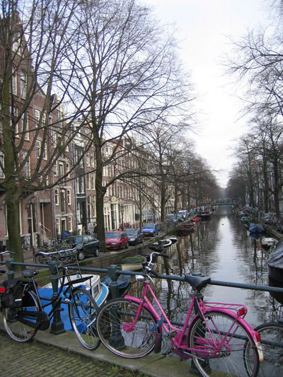 De Amsterdamse Bloemgracht in februari 2006. Eigen foto